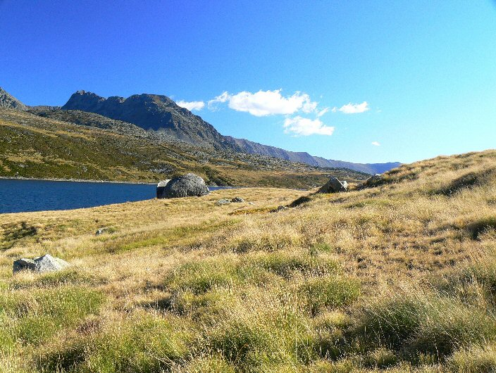 Pic Carlit visto dallo stagno di Lenoux